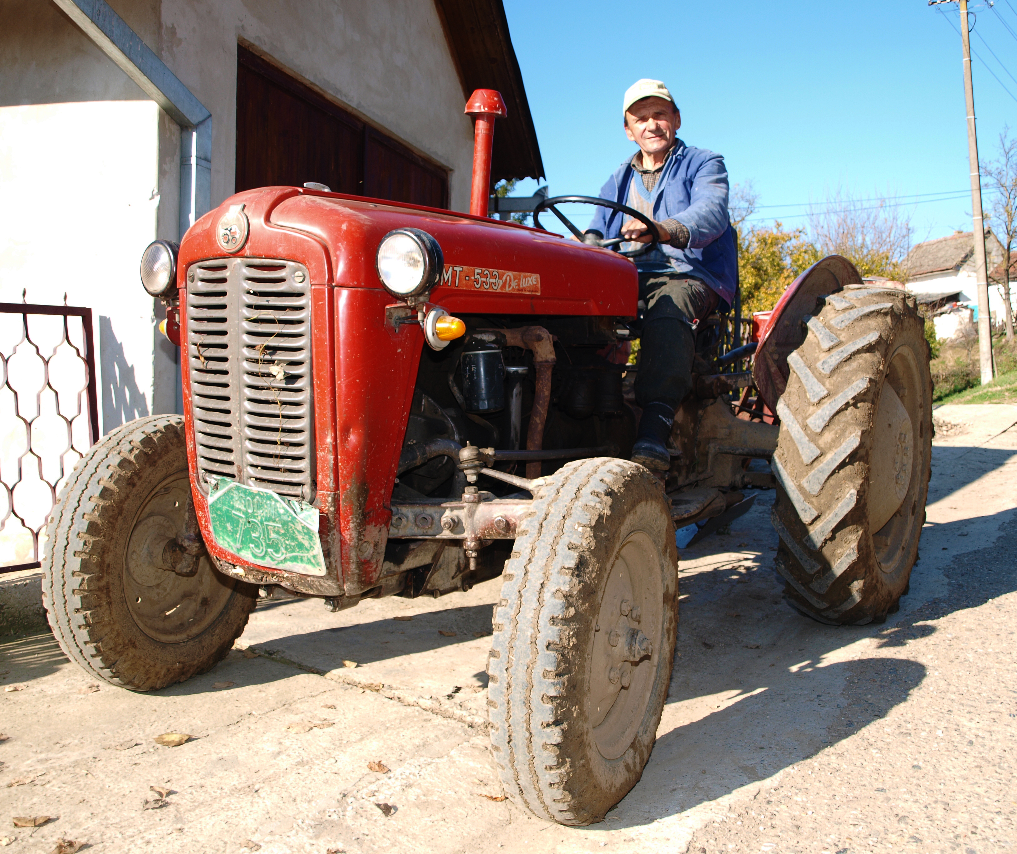 IMT 533 de luxe. Susek, Srbija.